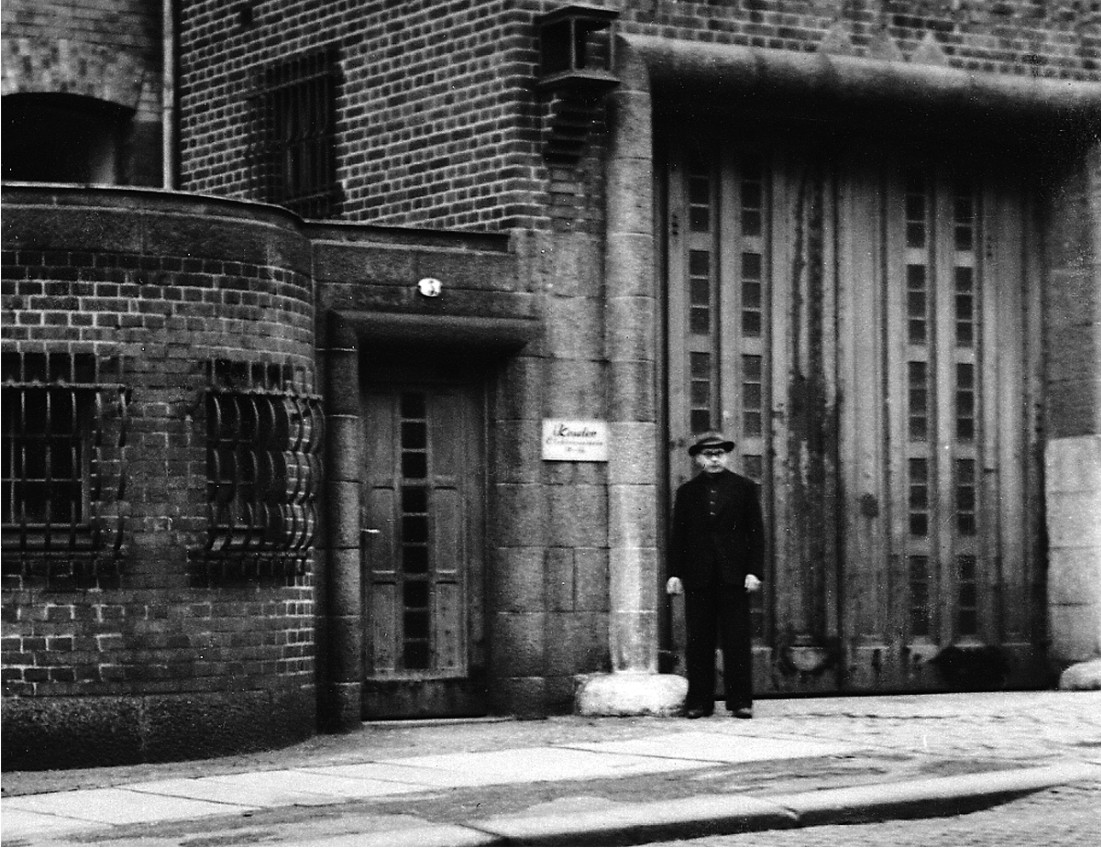 Franz Kessler vor seinem Werk in Chemnitz. Das Gebäude steht immer noch und beherbergt heute eine soziale Einrichtung.